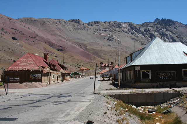 Ruta Nacional 7 approaching Las Cuevas